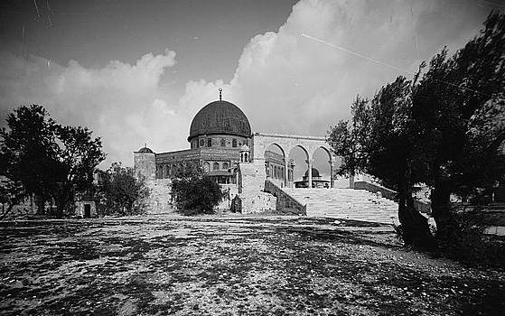 הר הבית מתוך אוסף תצלומים שצולם בין השנים 1898-1946 בירושלים